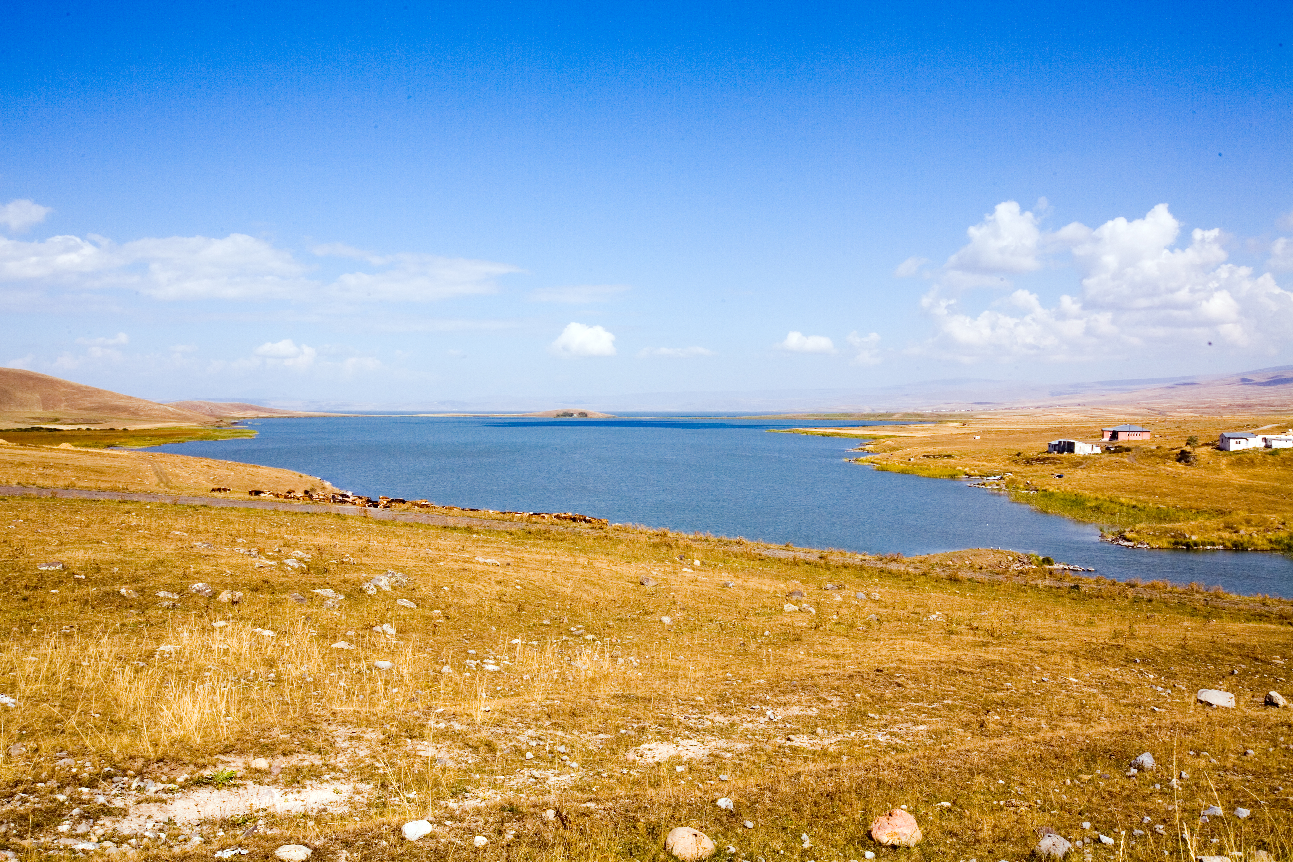 Lake Çıldır in Turkey.